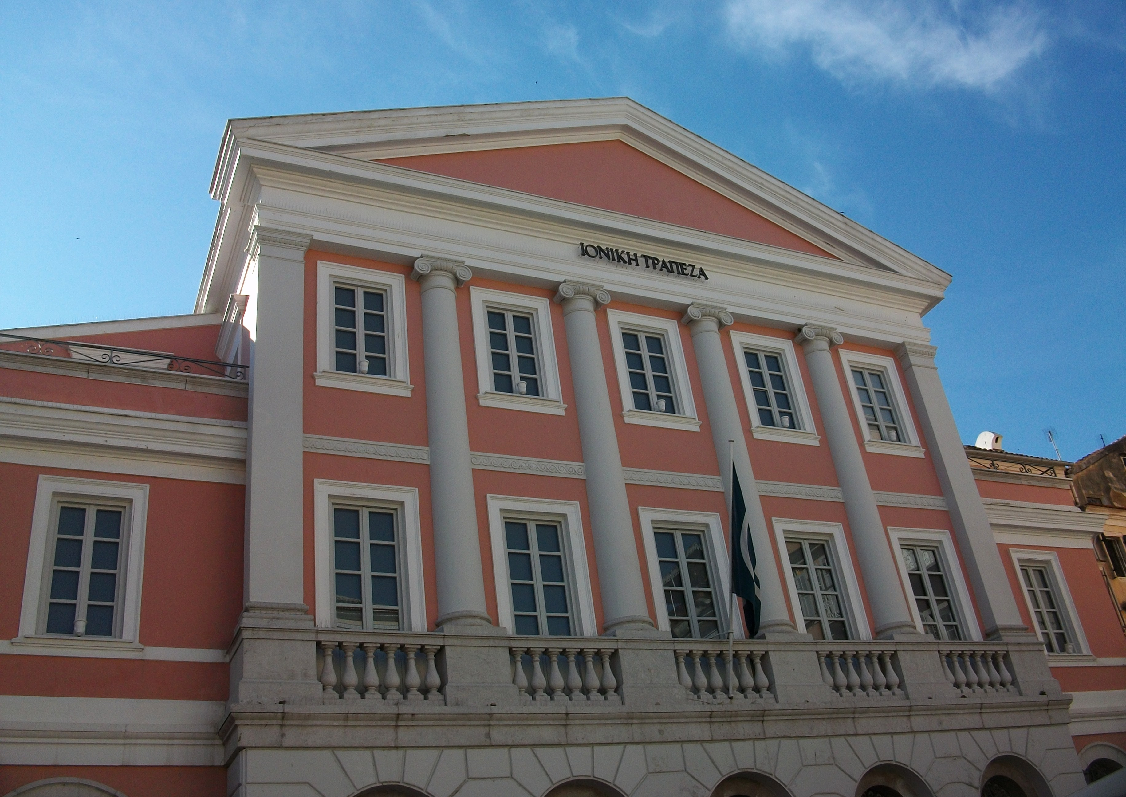 Edifici del Banc Jònic, museu del Paper Moneda de Corfú.